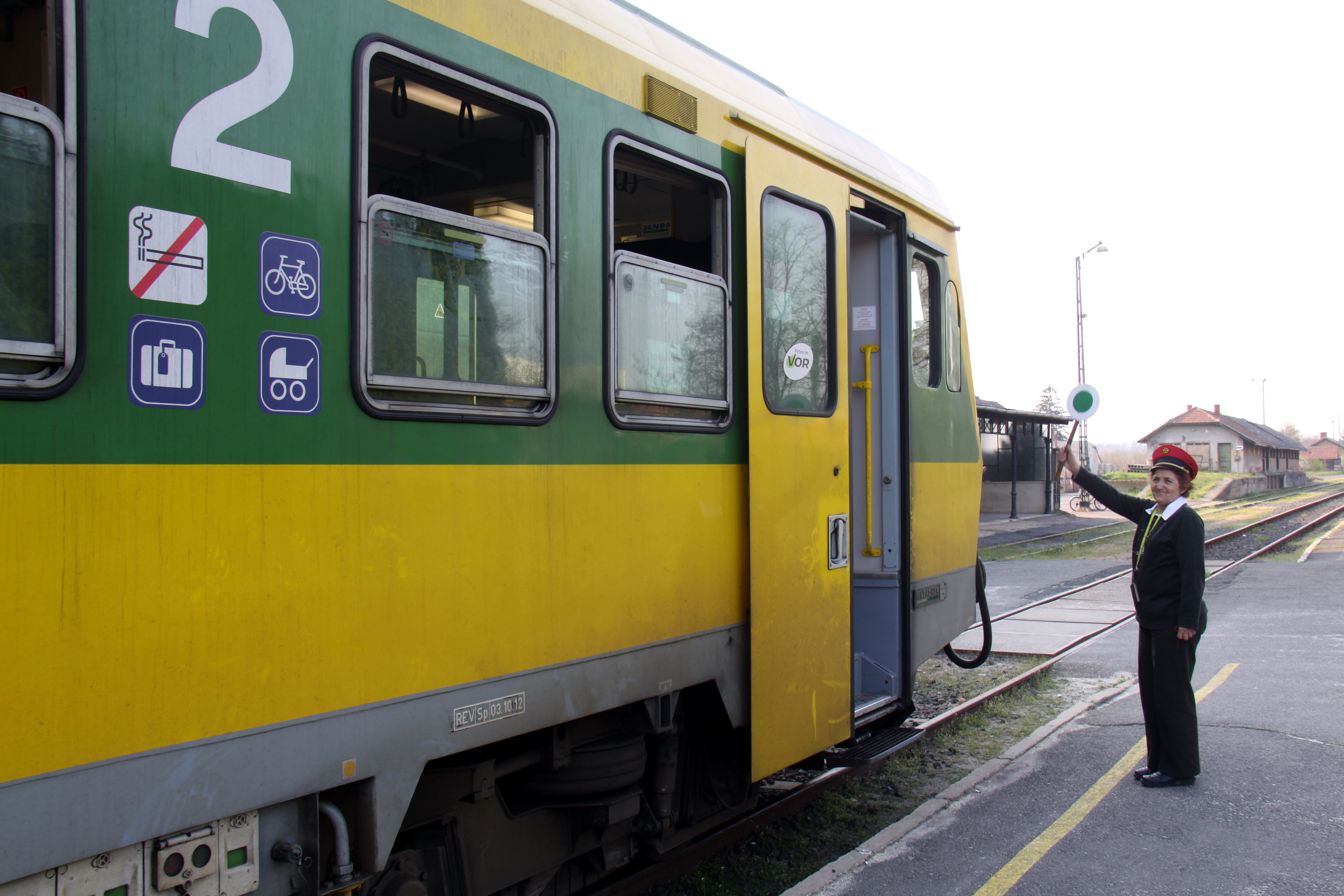 Lokalbahn Szombathely–Kőszeg - Bahnhof Kőszeg.